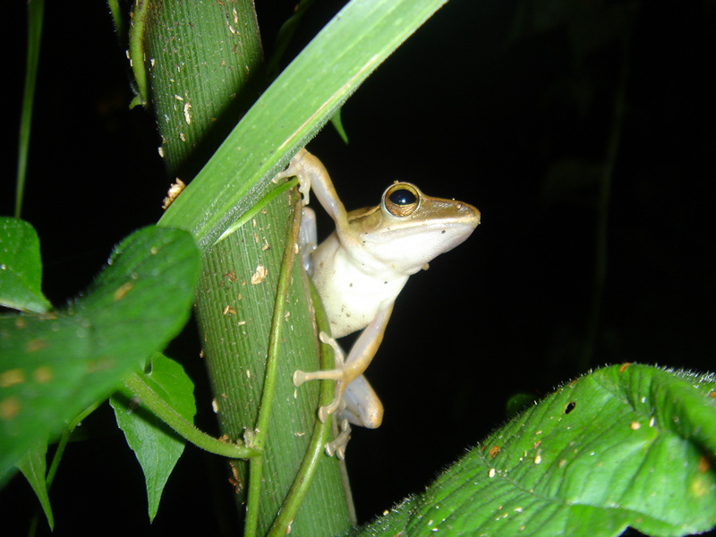 Taman Negara. Beobachtung von nachtaktivene Tieren. Hier wartet ein Frosch auf Beute. Mehr auf